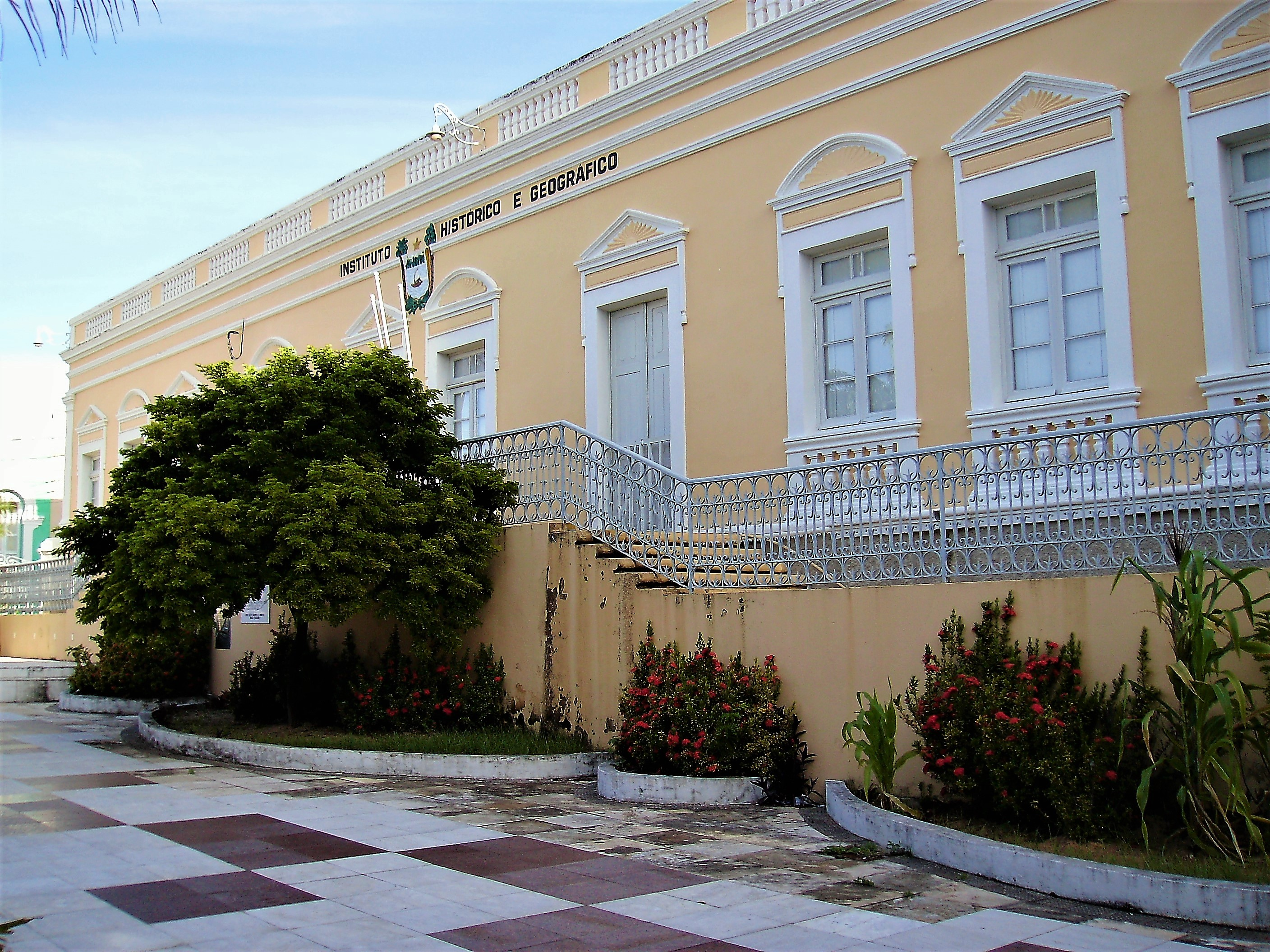 Centro Histórico de Natal